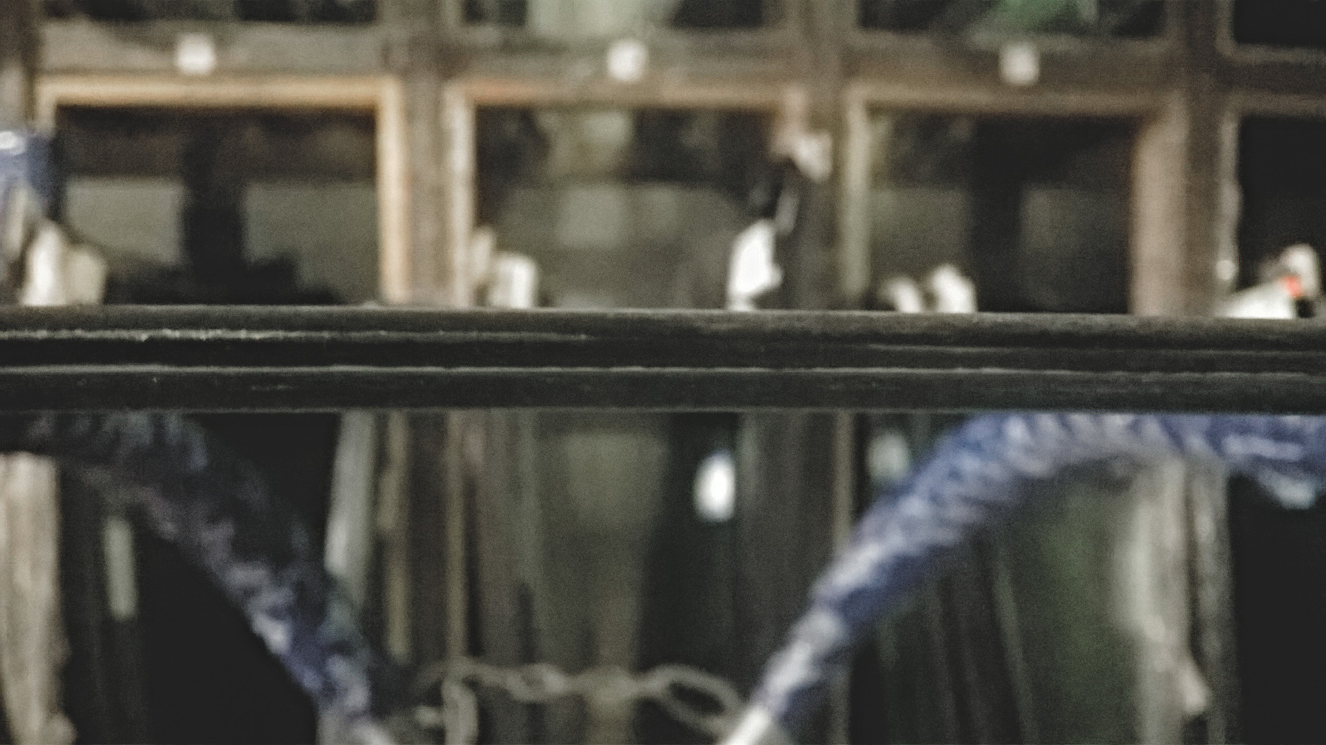 Структура шматслойнага аўтамабільнага шкла